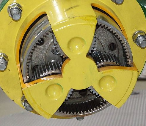 Planetengetriebe in einem Traktor (Gehäuse aufgeschnitten): zentrales Sonnenrad (verdeckt), drei Planetenräder, äußeres Hohlrad